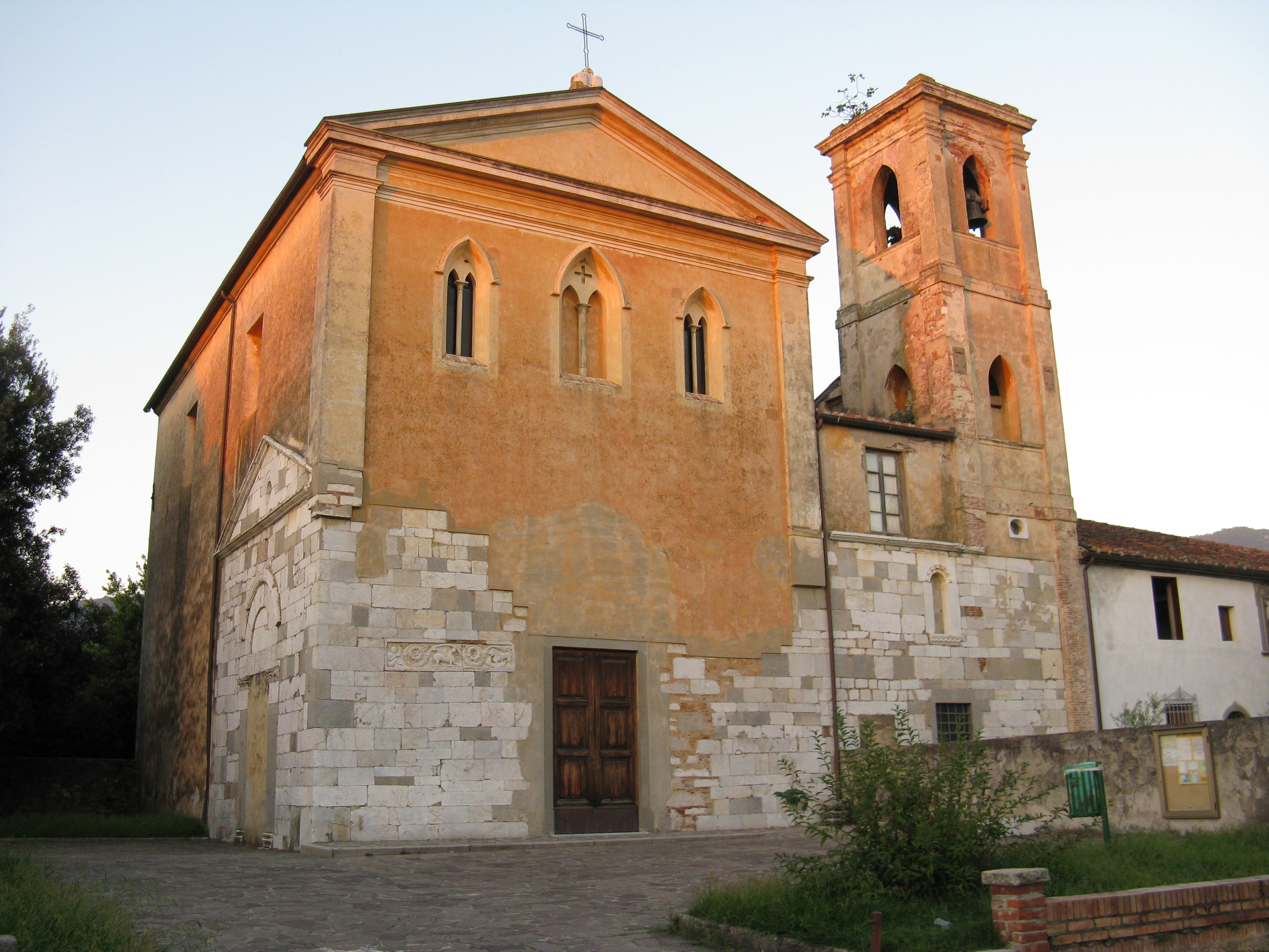 Chiesa di Santa Maria di Pappiana, nel comune di San Giuliano Terme (PI)